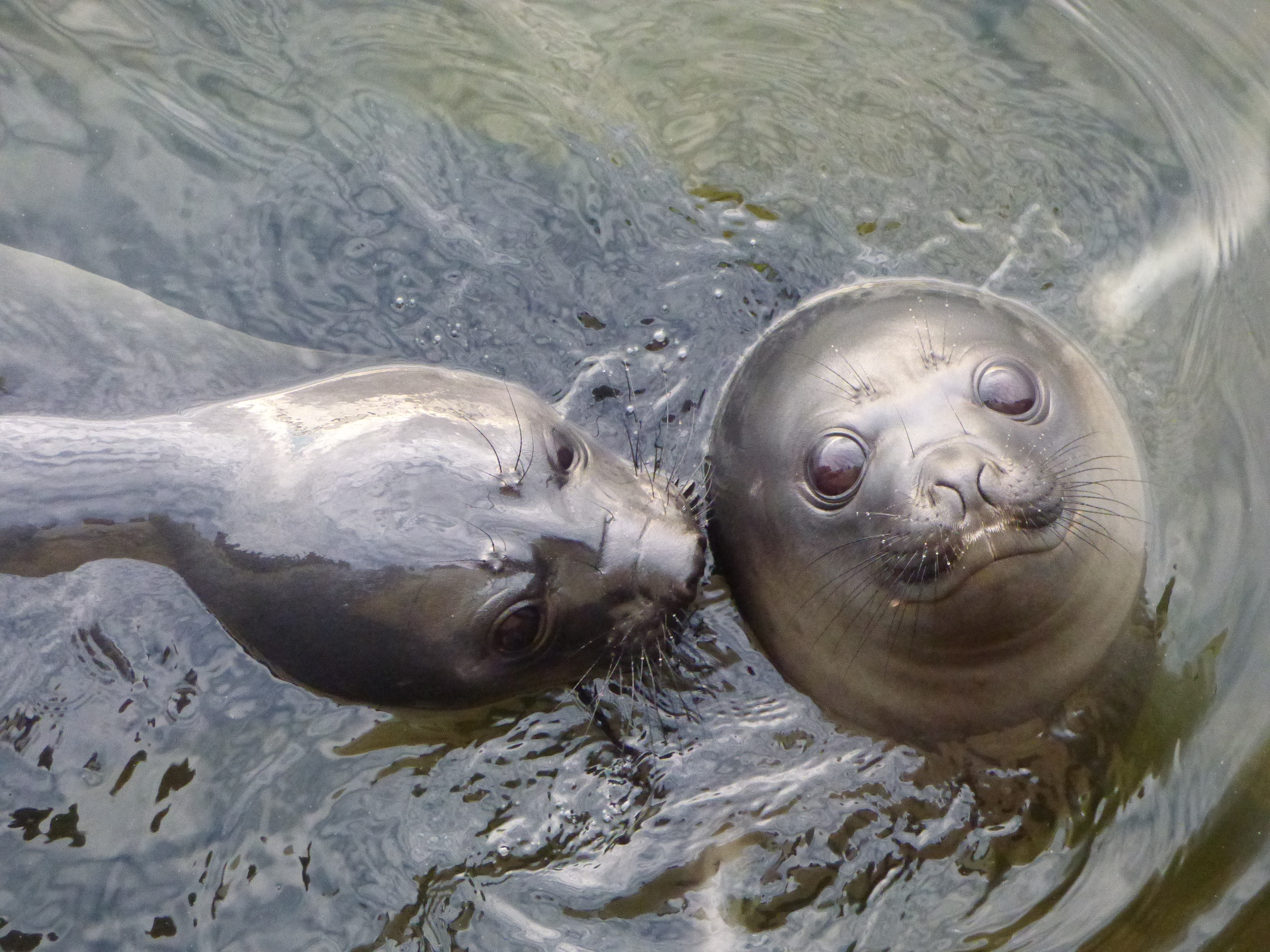 Jeunes éléphants de mer dans la réserve des TAAF à proximité de l'archipel des Kerguelen (iles sub-antarctiques)